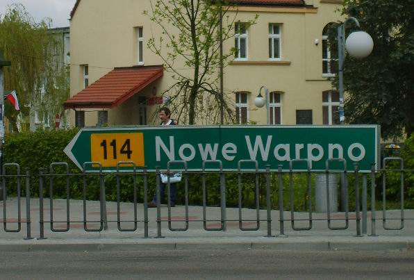 The way No. 114 in The Old Town of Police, Pomerania region in Poland / Droga wojewódzka nr 114, Police, Rynek Starego Miasta